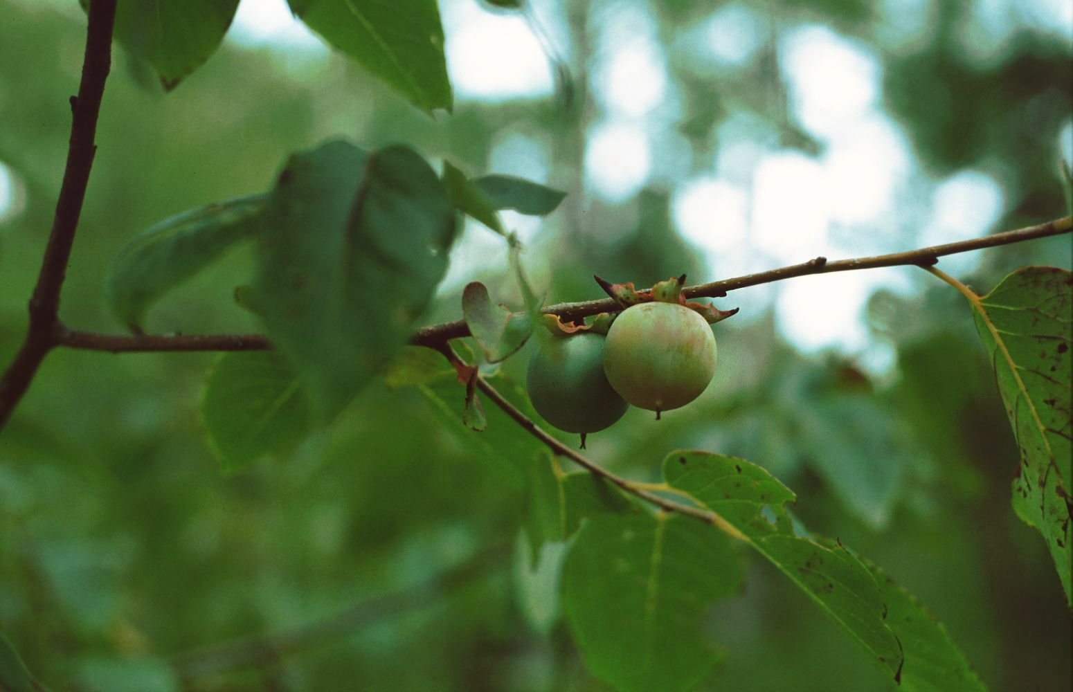 Diospyros virginiana, Ebenholzgewächse (Ebenaceae) – USA, Georgia: Stone Mountain ENE Atlanta (DeKalb County)